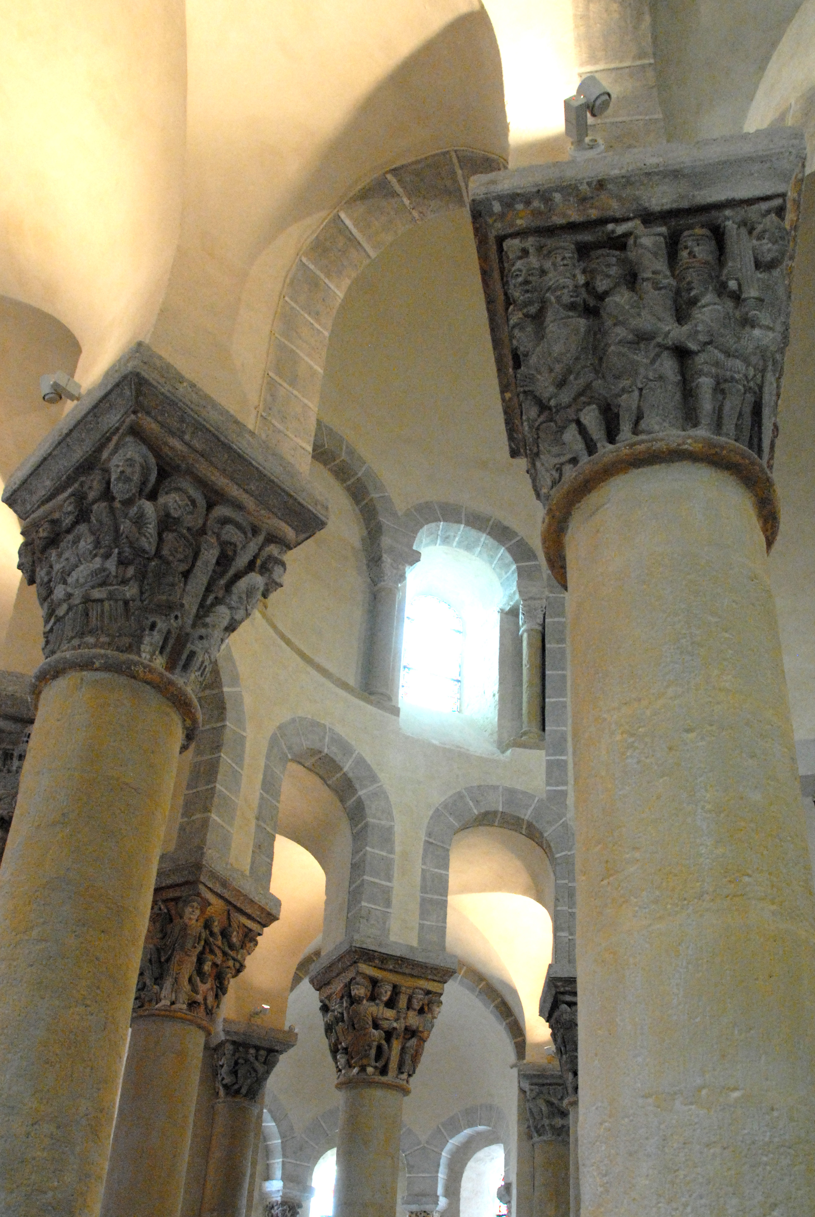 St.-Nectaire, Chorkapitelle A Seite 2 + C Seiten 11+10